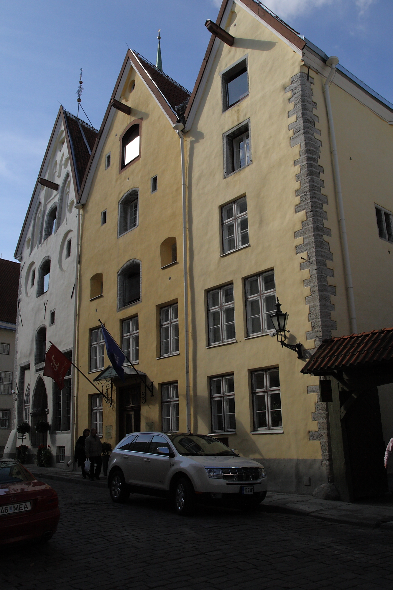 Tallinn, elamud "Kolm õde", 15.-19.saj